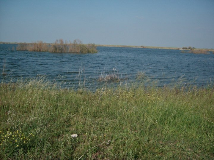 אגם זוהר